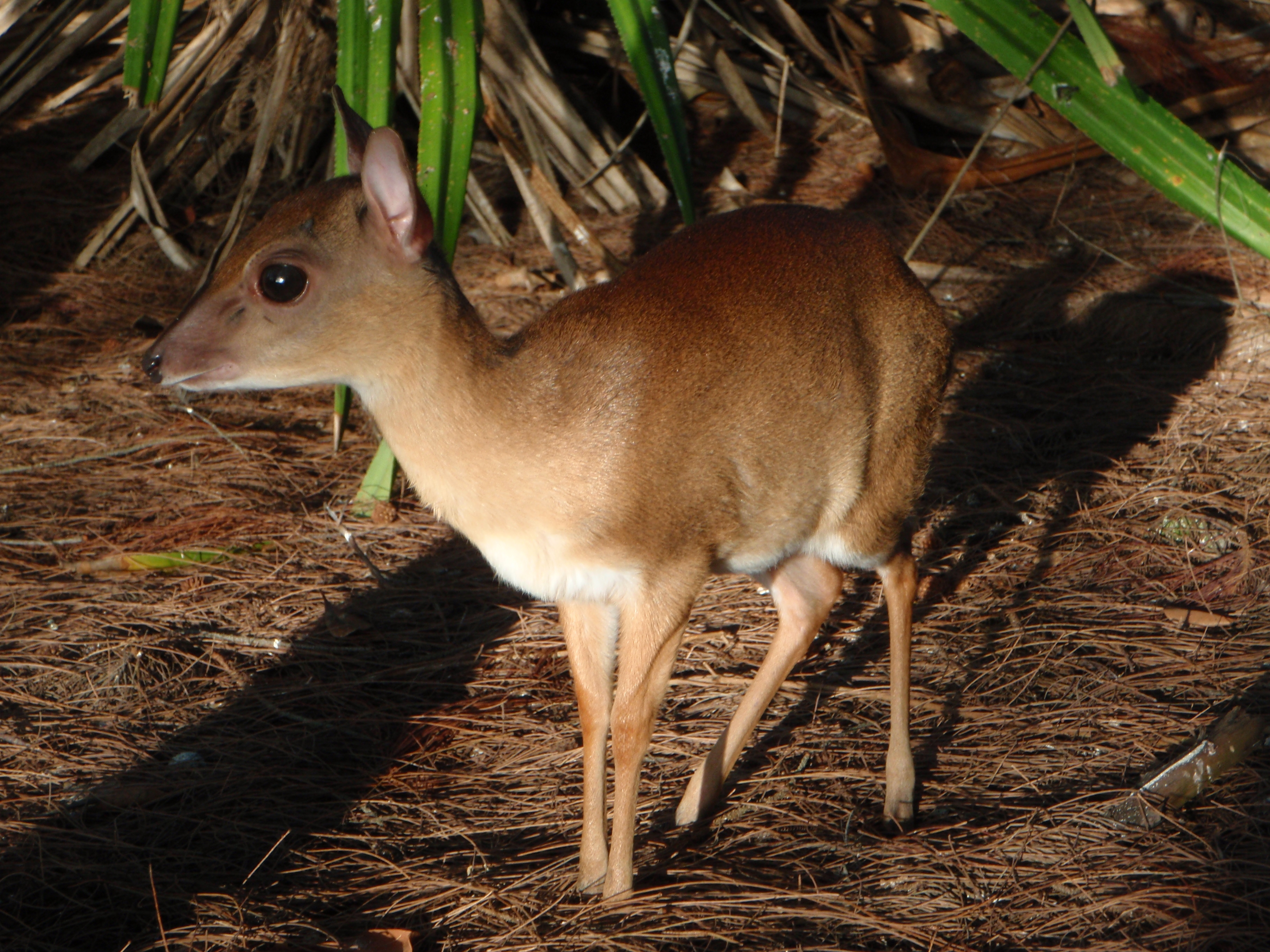 Suni in Mnemba, Zanzibar